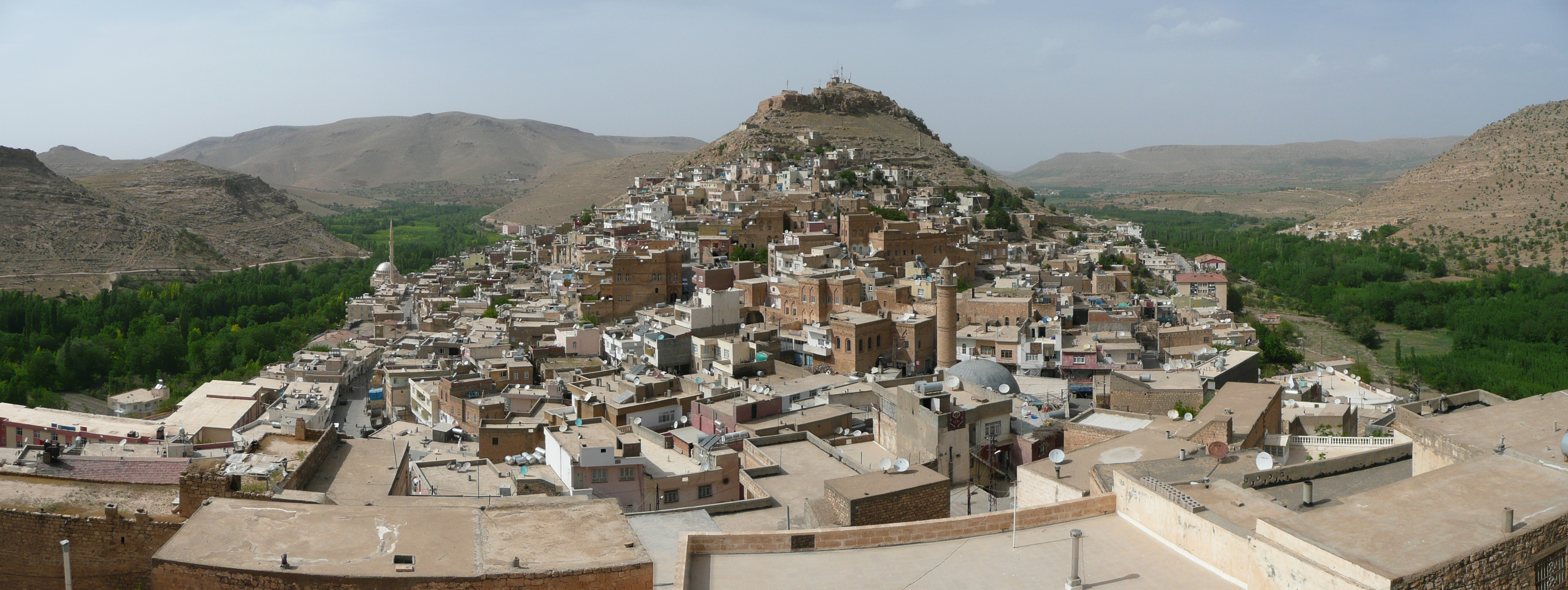 Savur, Mardin, Turkey